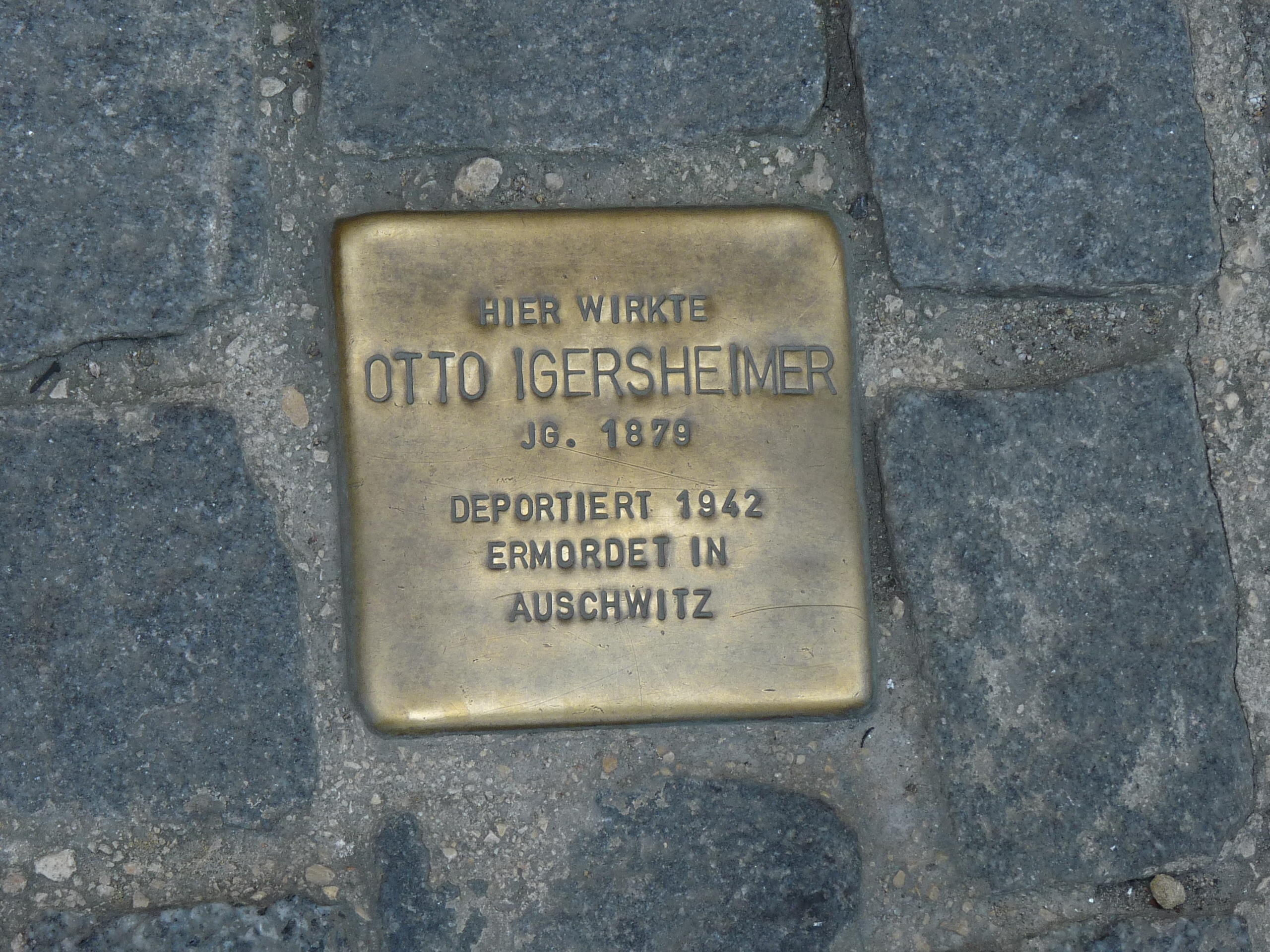 Stolperstein vor der Kaiserstraße 34 in Heilbronn: Hier wirkte / Otto Igersheimer / JG. 1879 / Deportiert 1942 / Ermordet in / Auschwitz